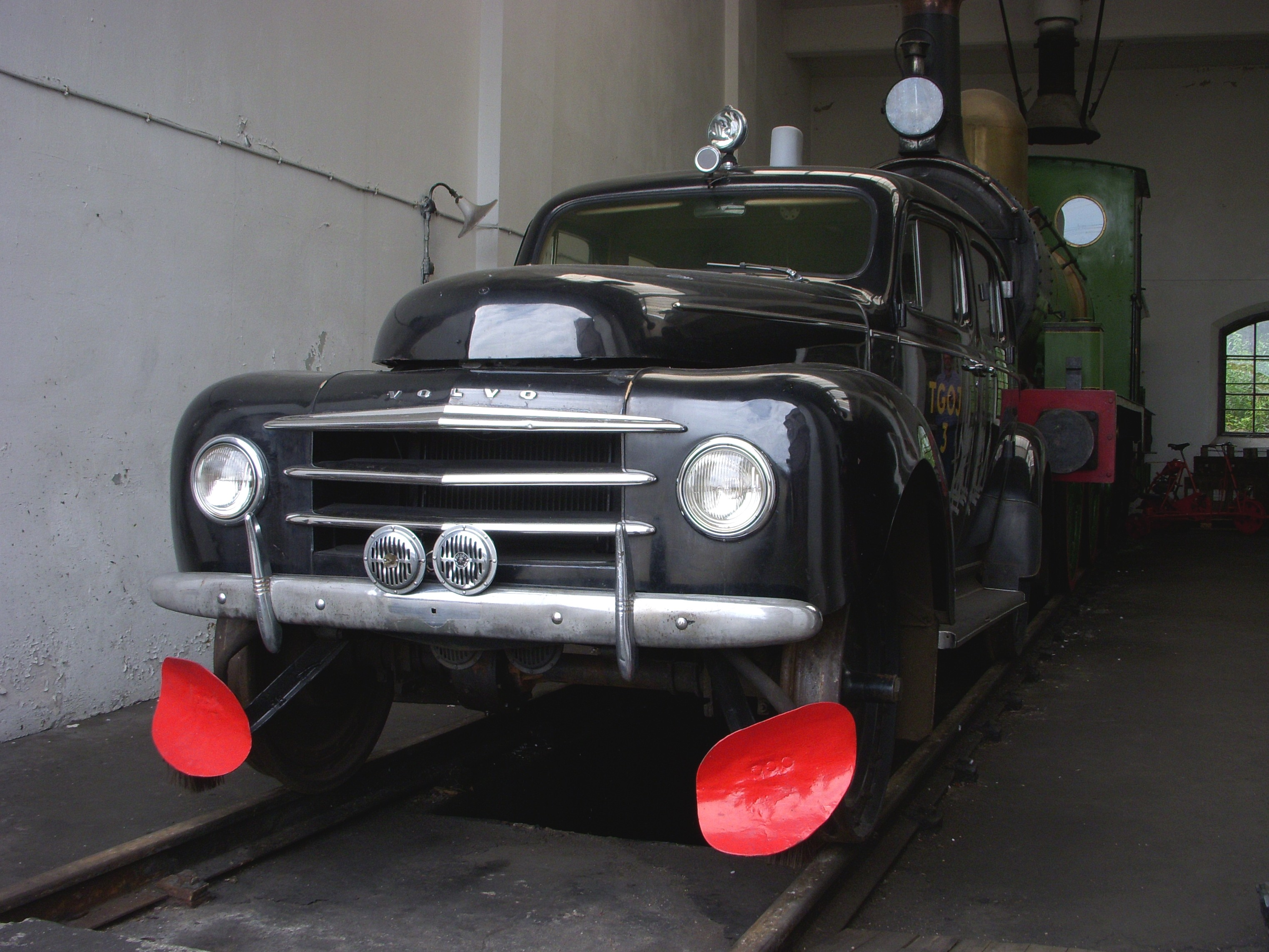 Lokmuseet i Grängesberg